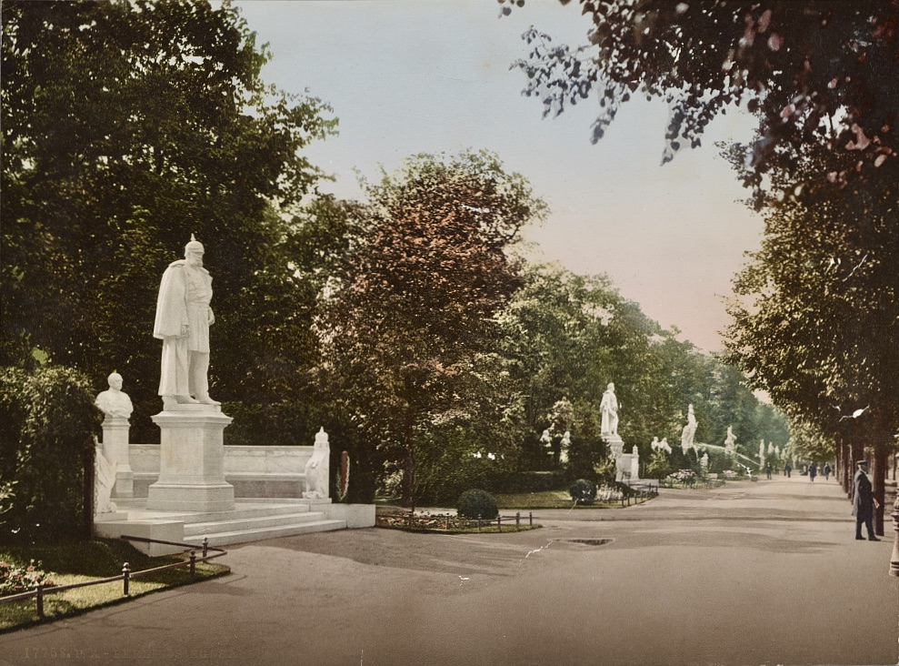 Berlin Siegesallee um 1900